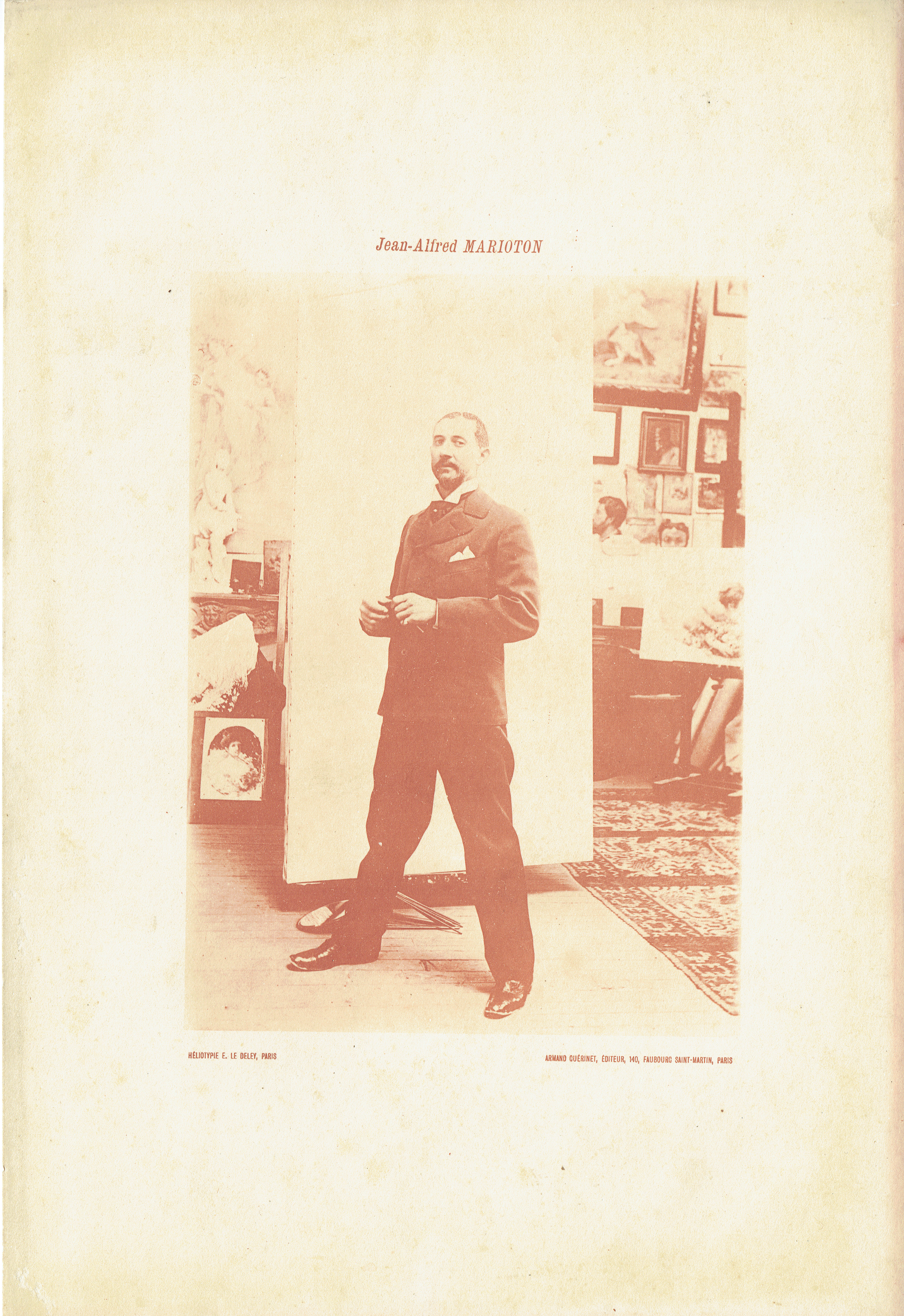 Dessin, croquis ou étude... par Jean-Alfred Marioton, avant 1903, publiés chez Guérinet en 1905